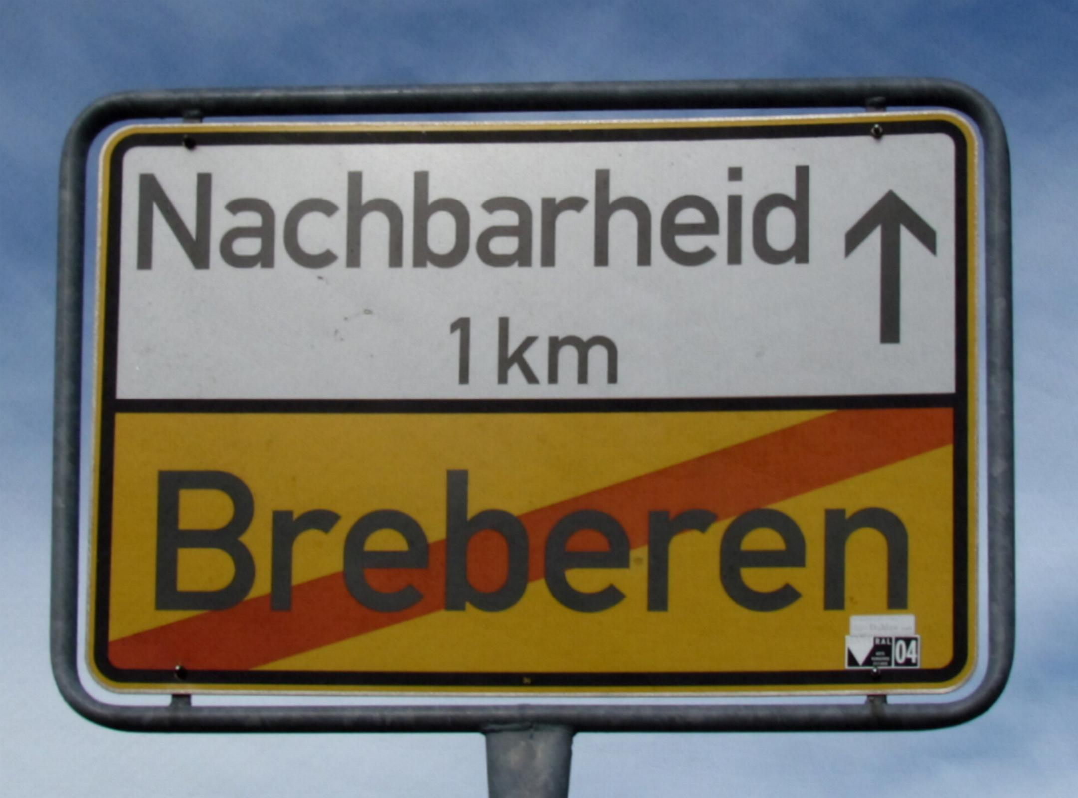 Ortsschild nach Nachbarheid